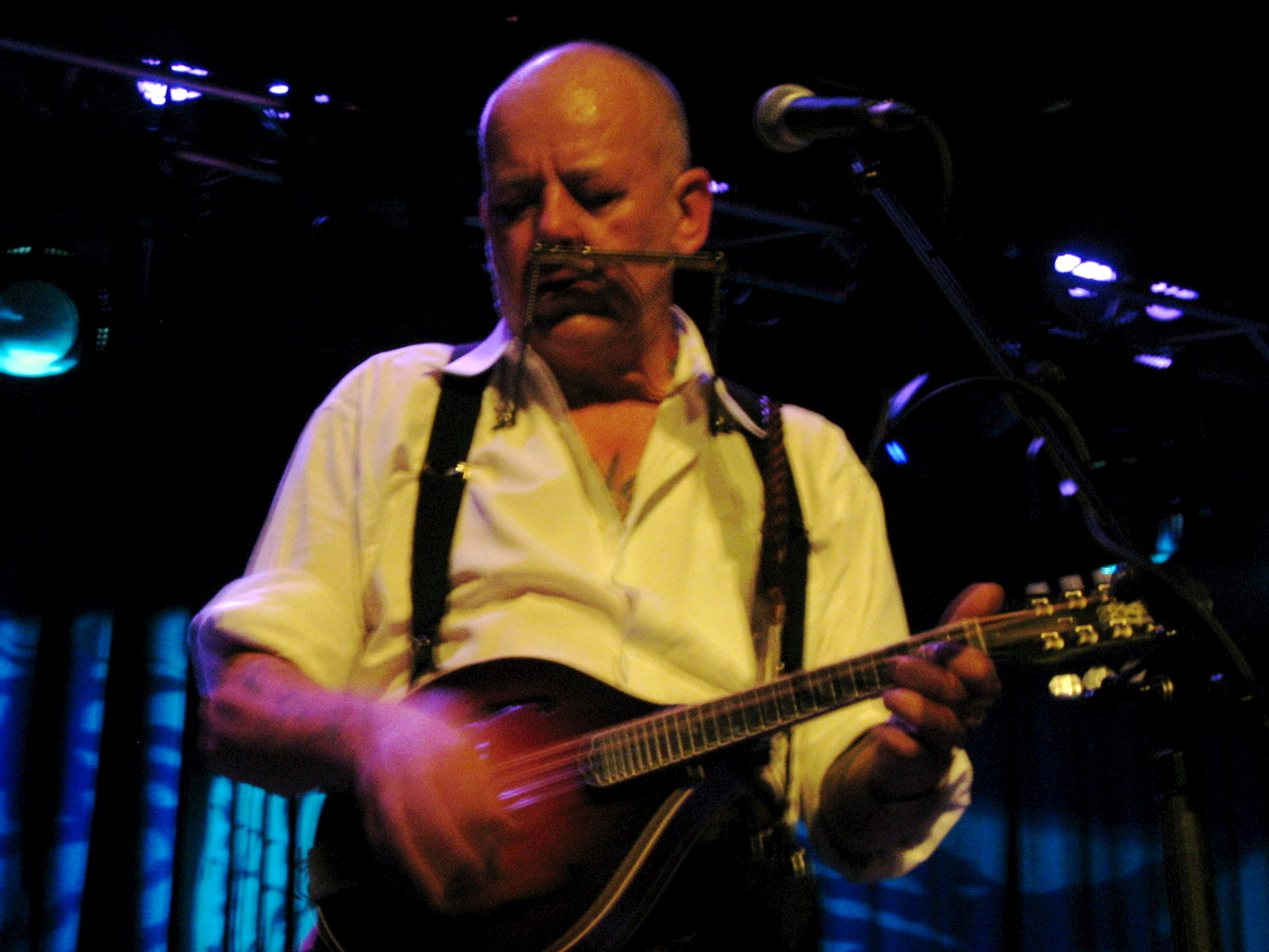 Willie P. Bennett tijdens het Roots of Heaven festival in Haarlem (2006)